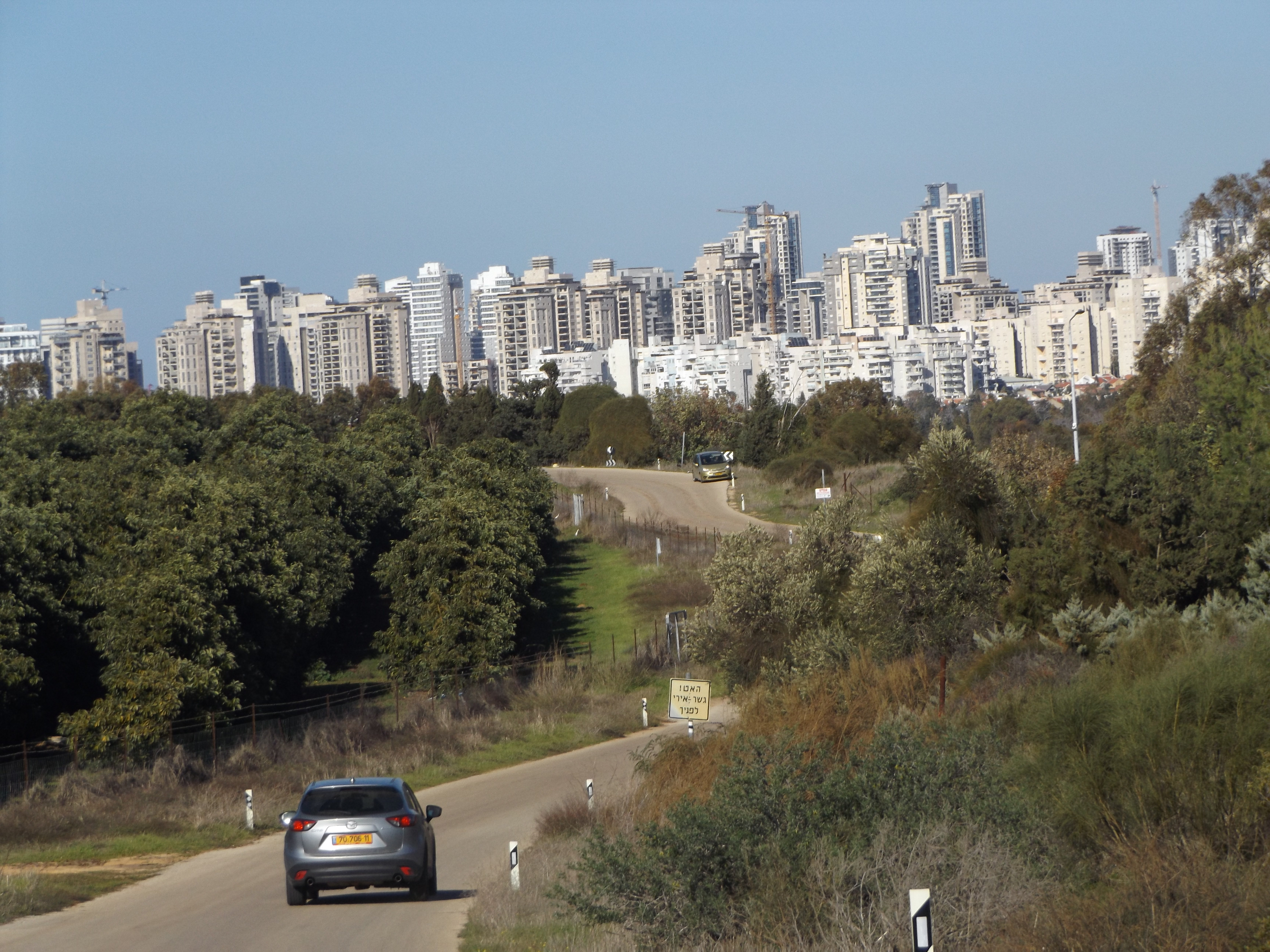 פולג צילום אוראל המאווי תיכון רוטברג